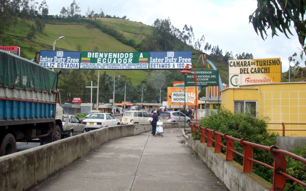 Puente Rumichaca